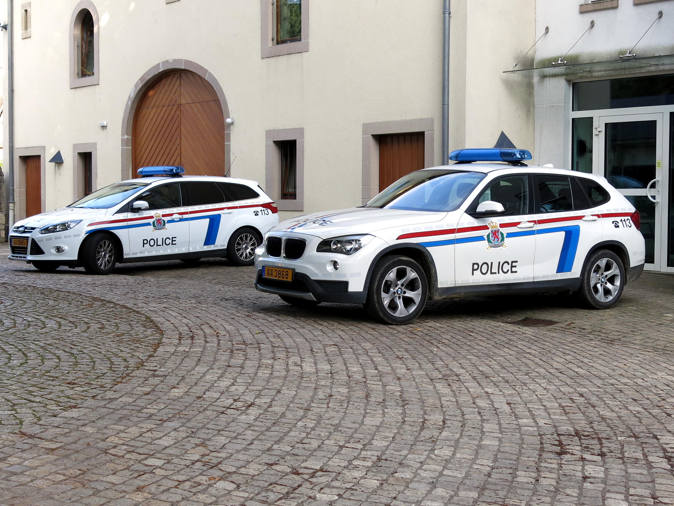 Policeautoë beim Kommissariat zu Miersch.